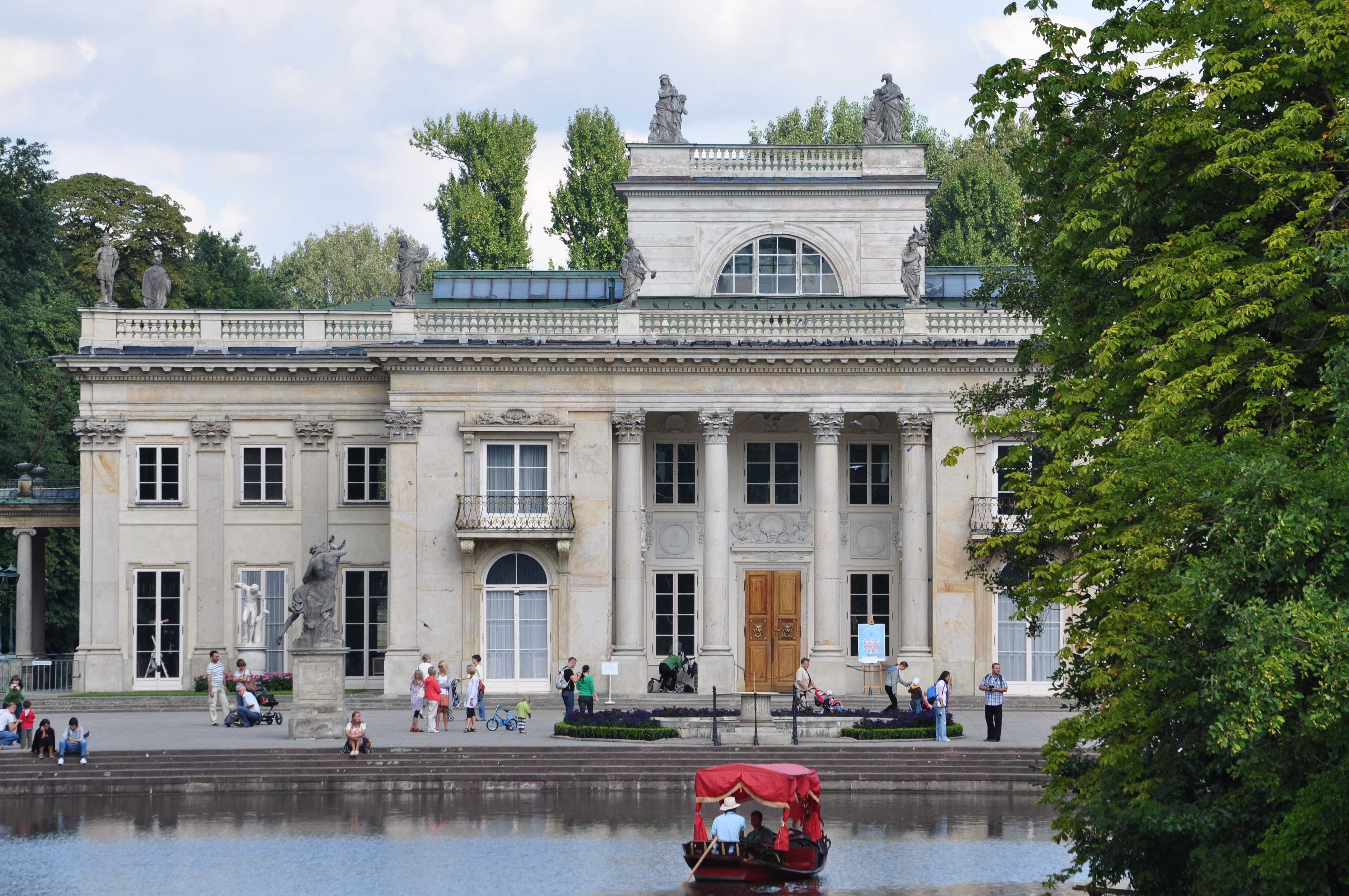 Warszawa - Łazienki, Pałac na Wyspie